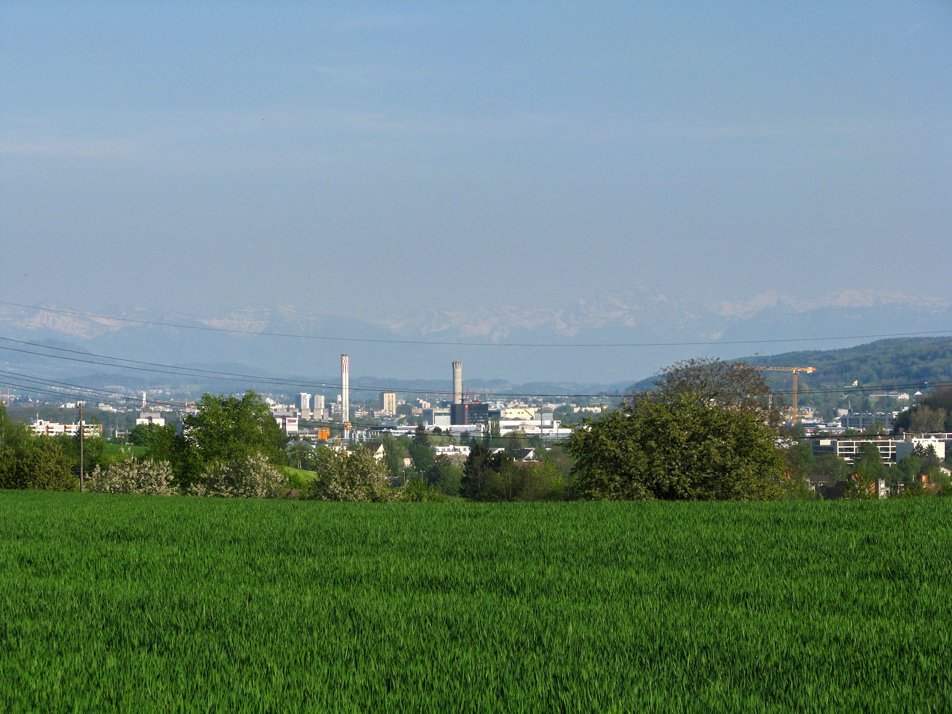 Glatt as seen from Rümlang